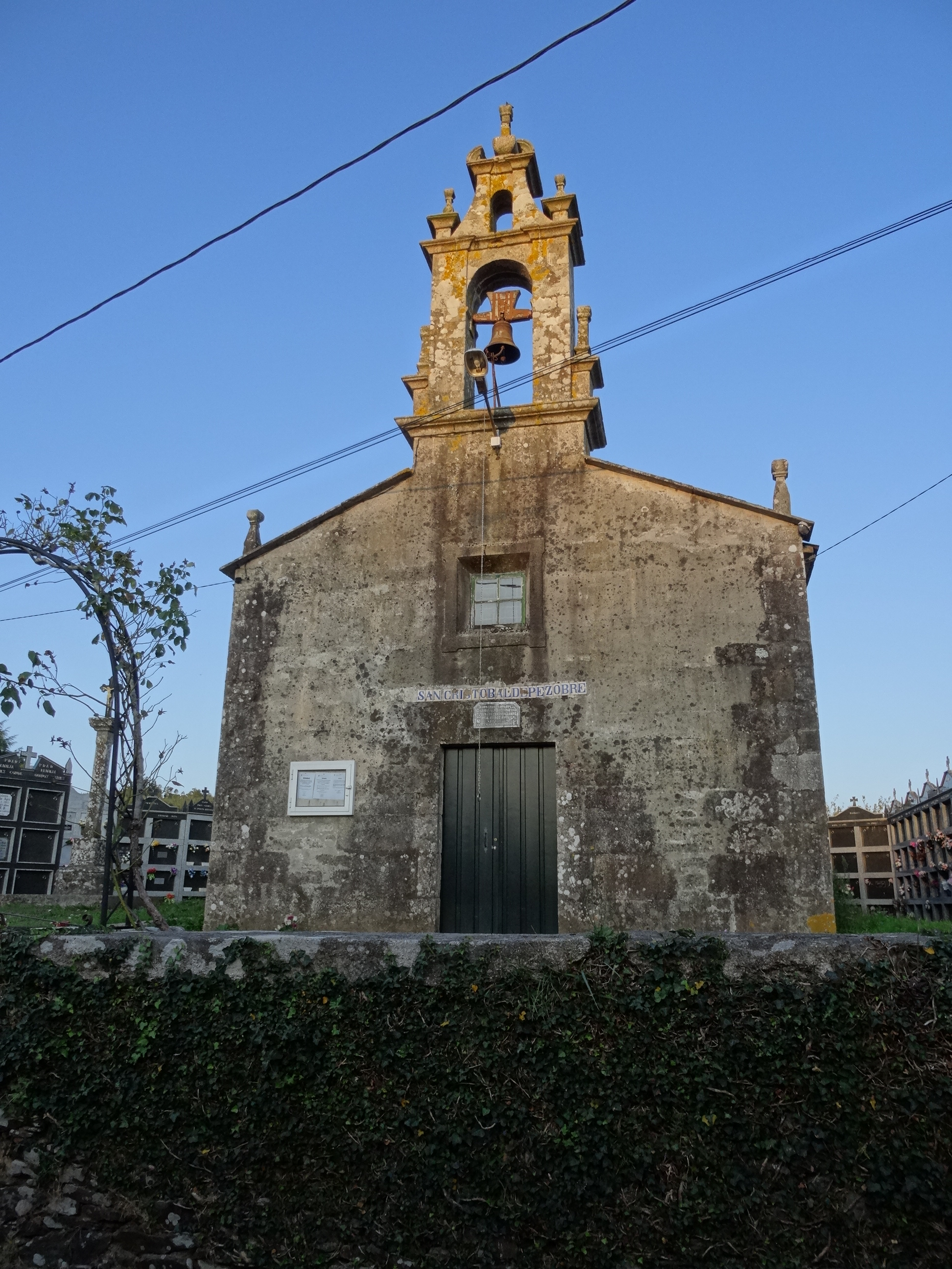 Igrexa de Pezobre no concello de Santiso, provincia da Coruña.